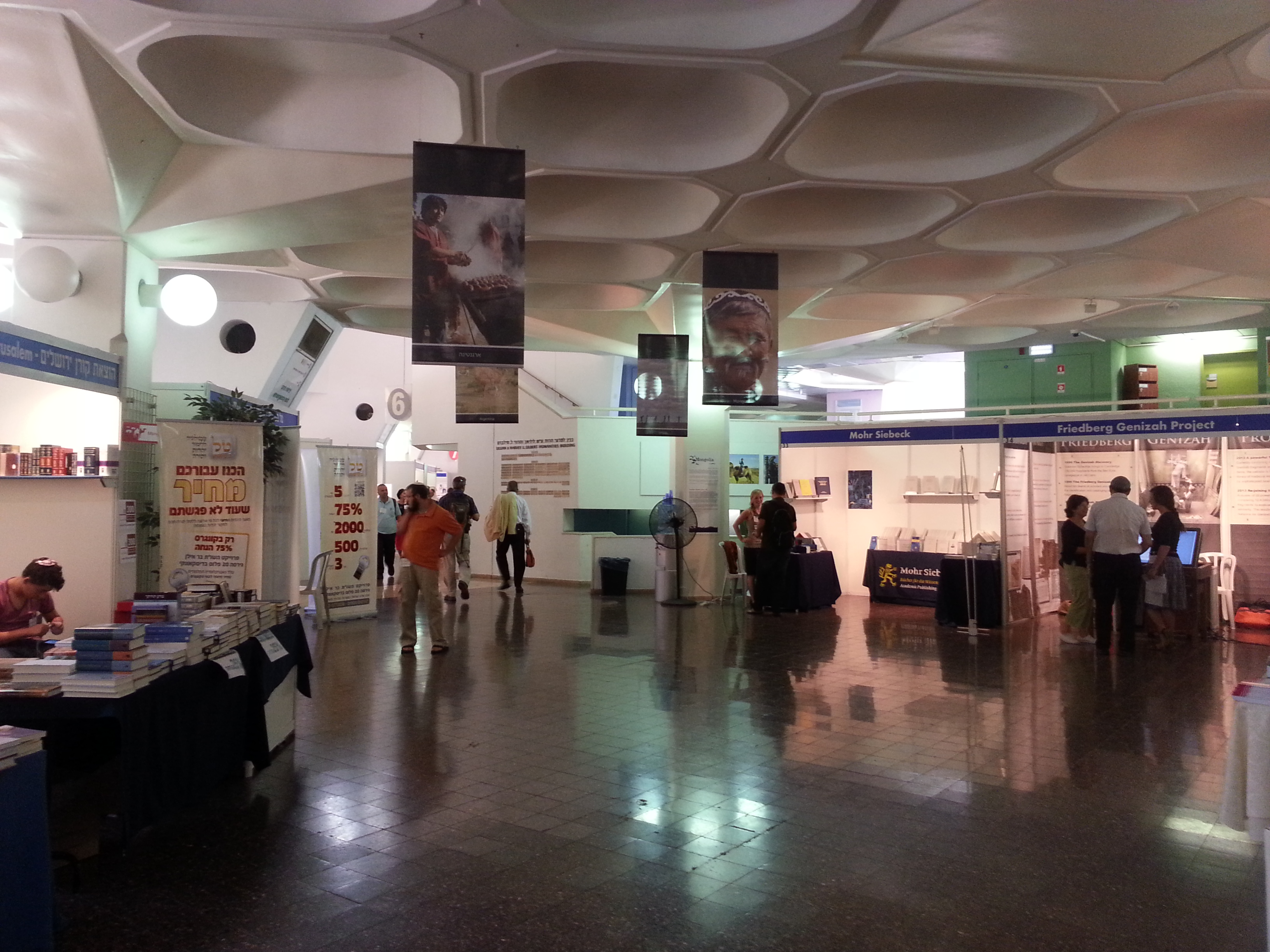 קהל בקונגרס העולמי ה-16 למדעי היהדות, בקמפוס הר הצופים בירושלים